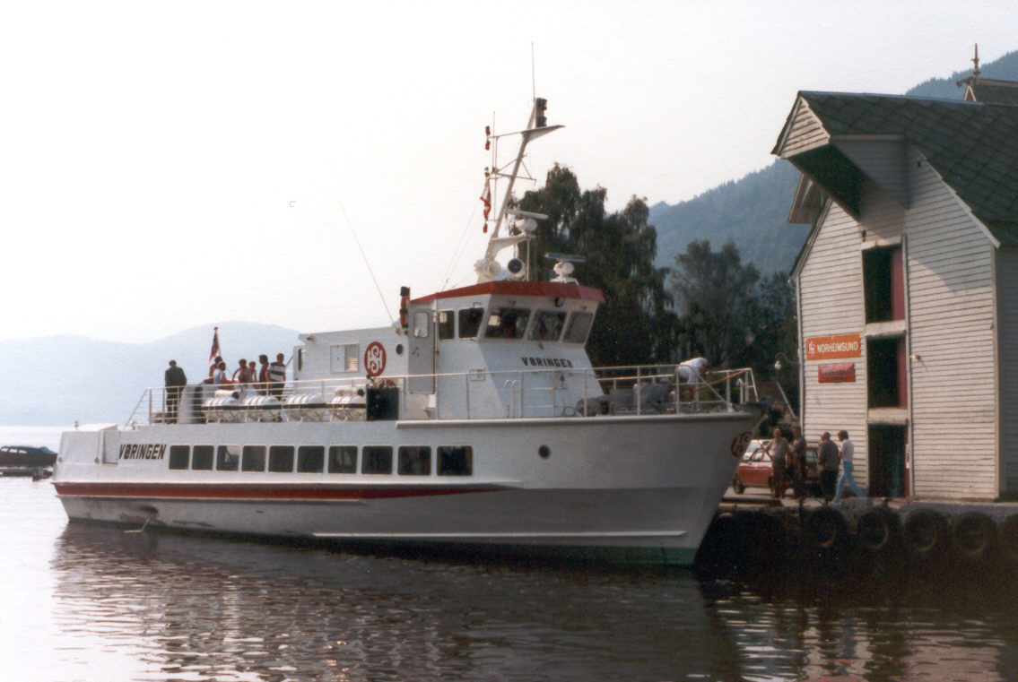 MS Vøringen in Nordheimsund, Norway.